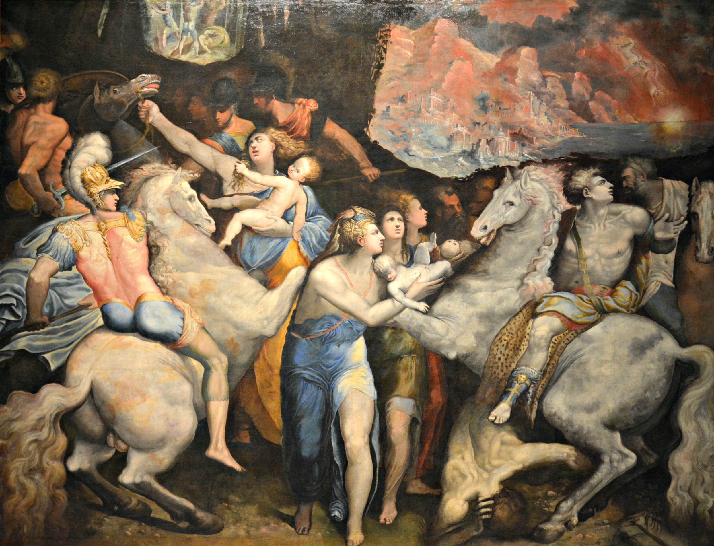 Vedi titolo